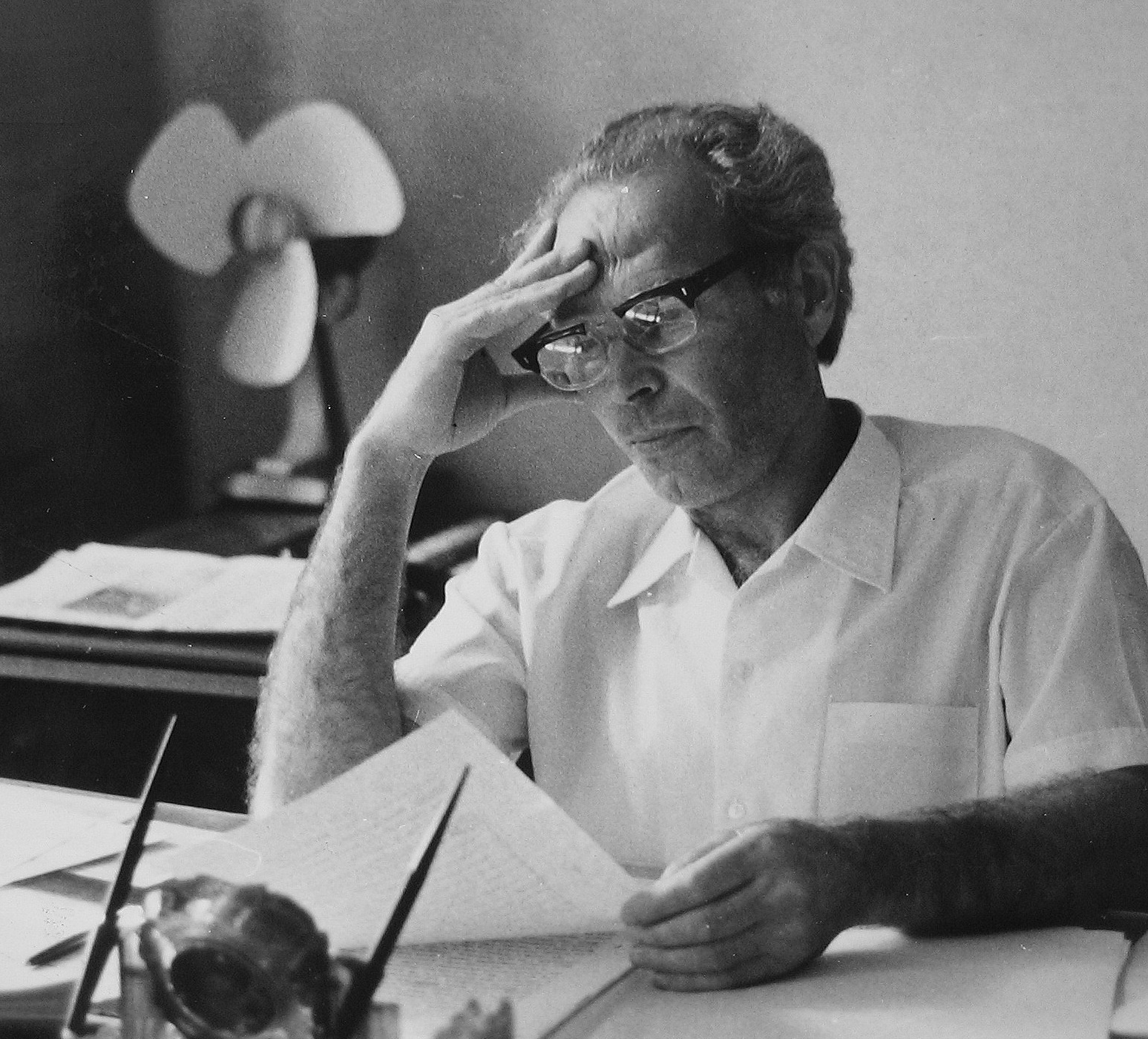 Петро Леонтійович Романюк